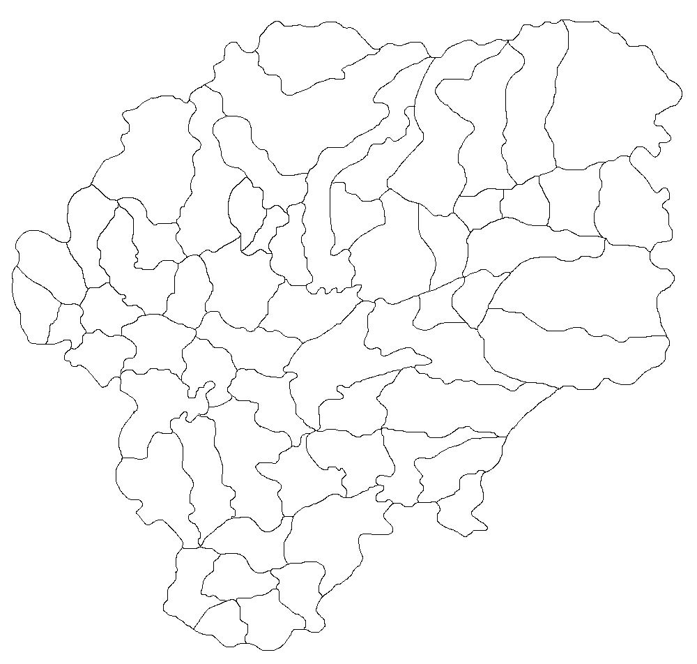 Categorie:Hărţi ale judeţului Bistriţa-Năsăud